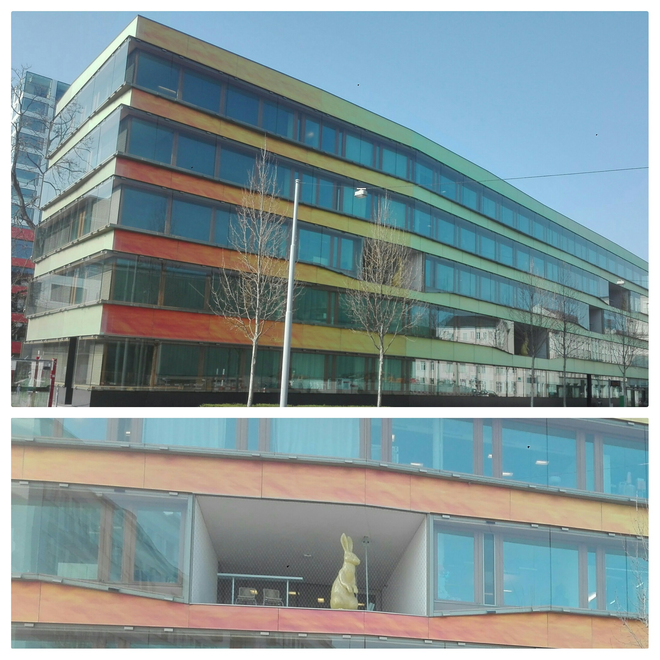 Universitäts-Kinderspital beider Basel